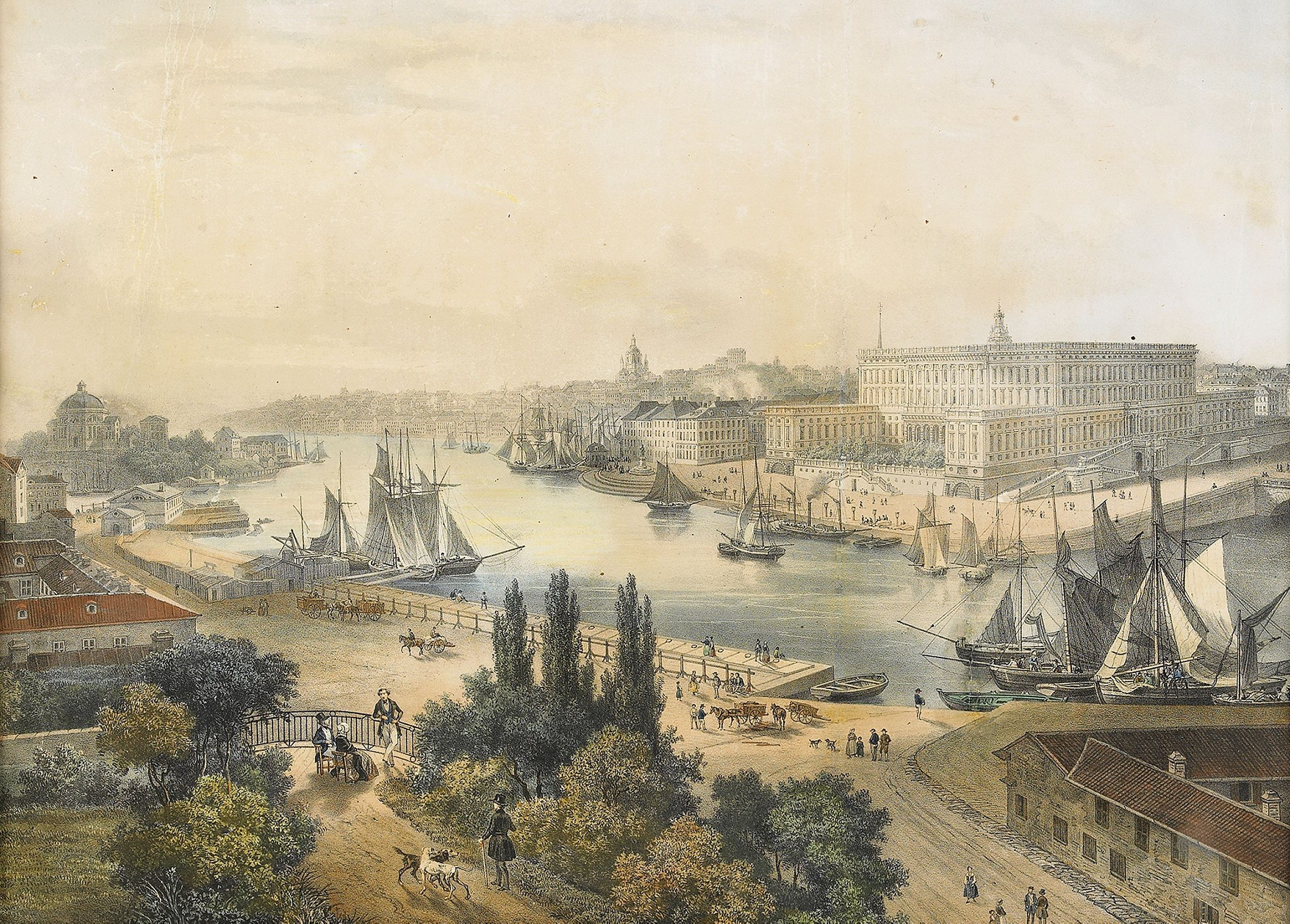 Vue de Stockholm